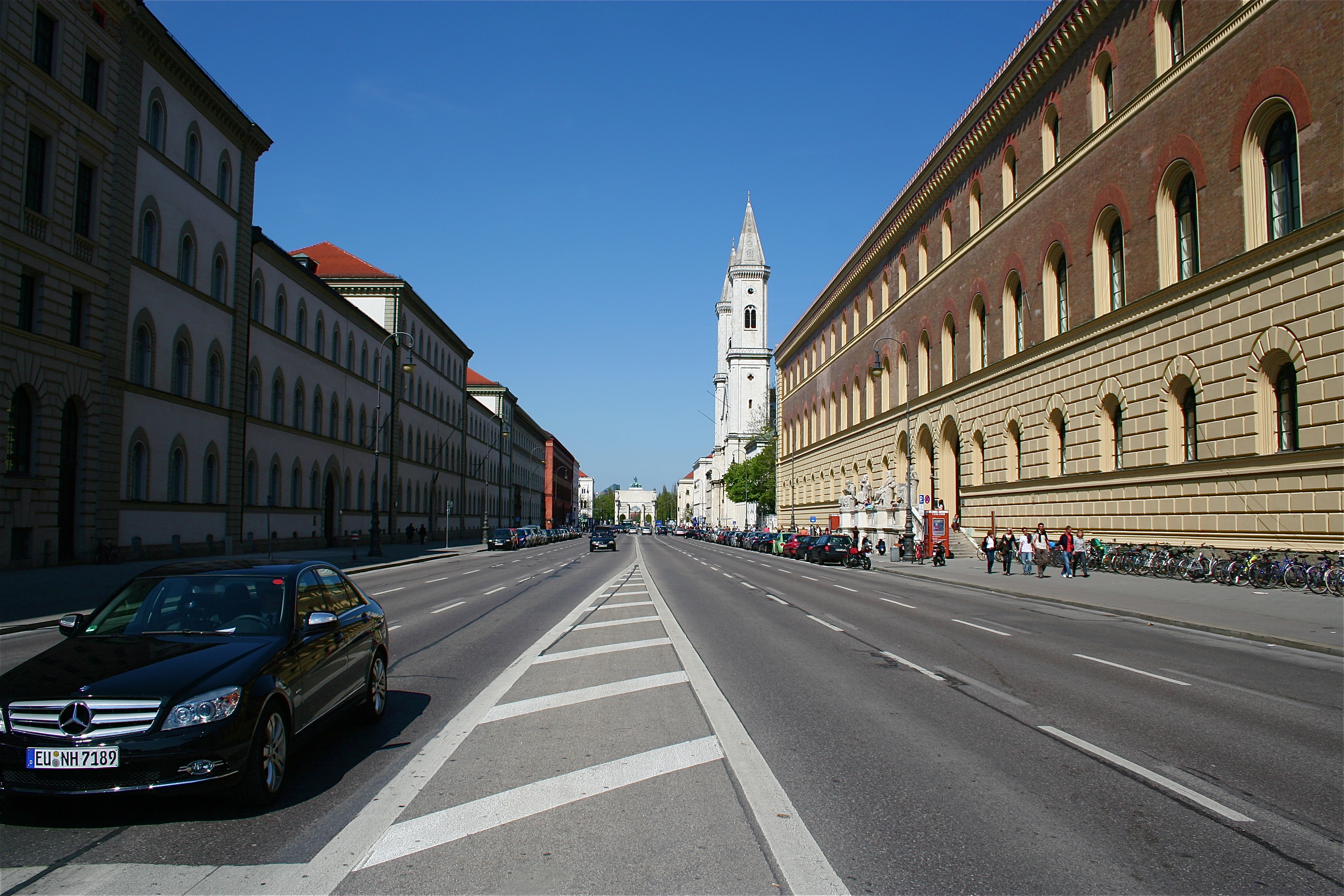 Ludwigstraße in München